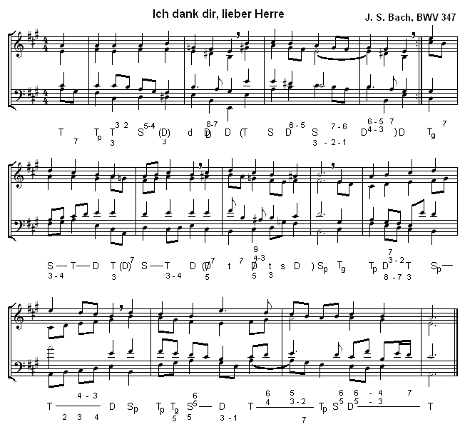 Beispiel einer funktionalen Analyse